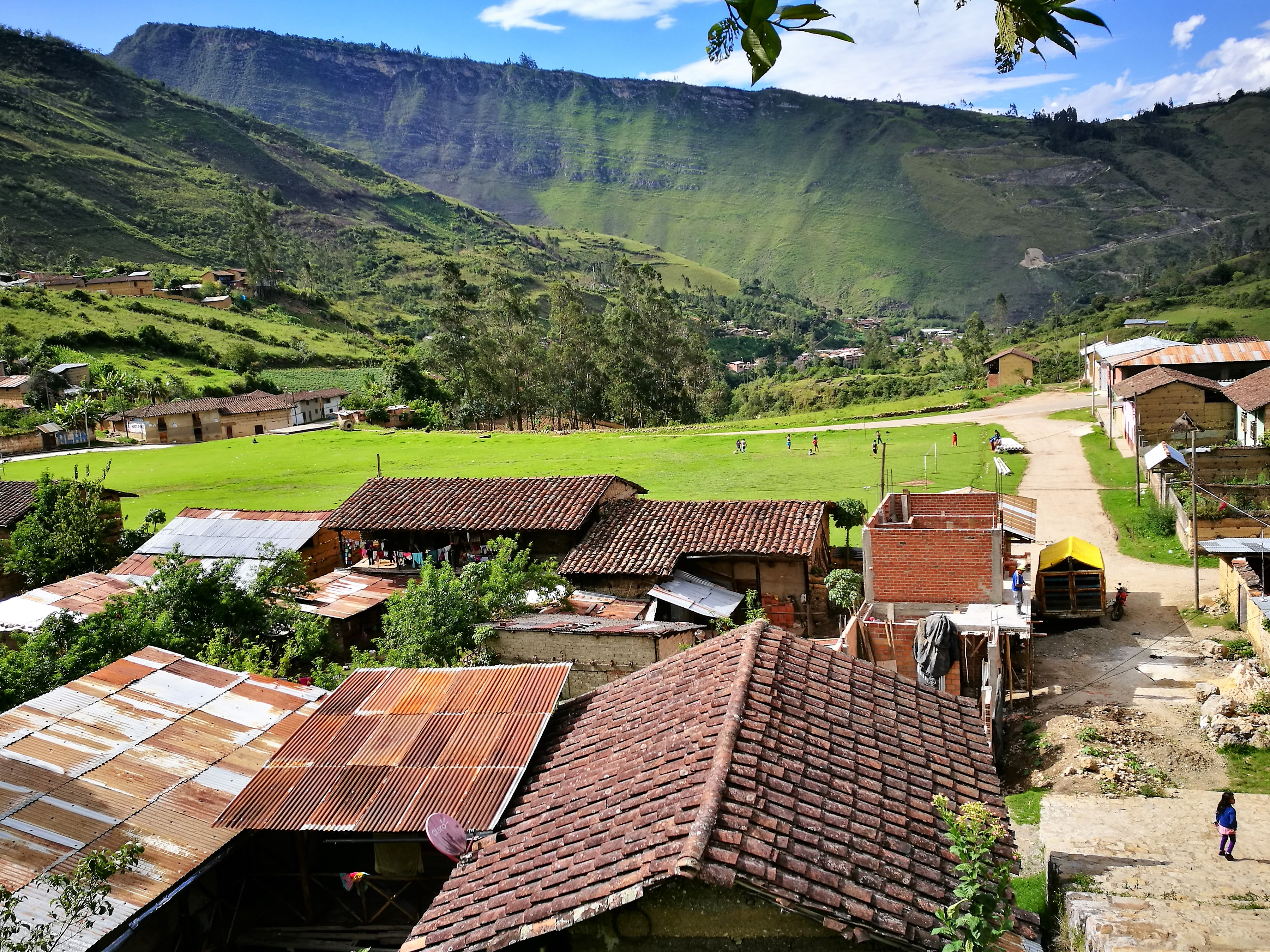 Camp de futbol de Leimebamba des de les escales que pugen al Museu